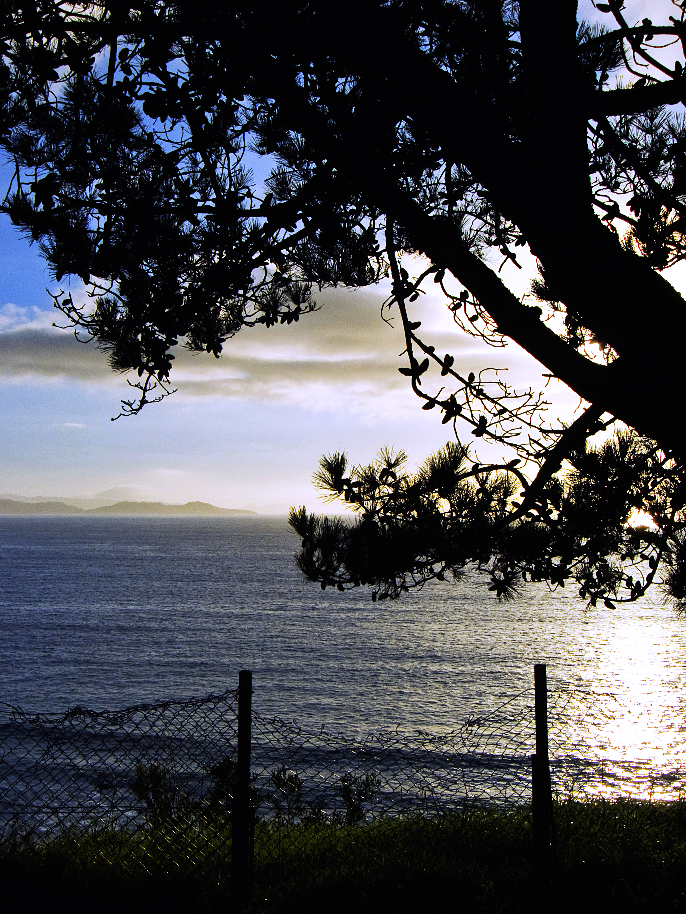 Un contraluz desde o Mirador de Palacios, en Sanxenxo. Galiza